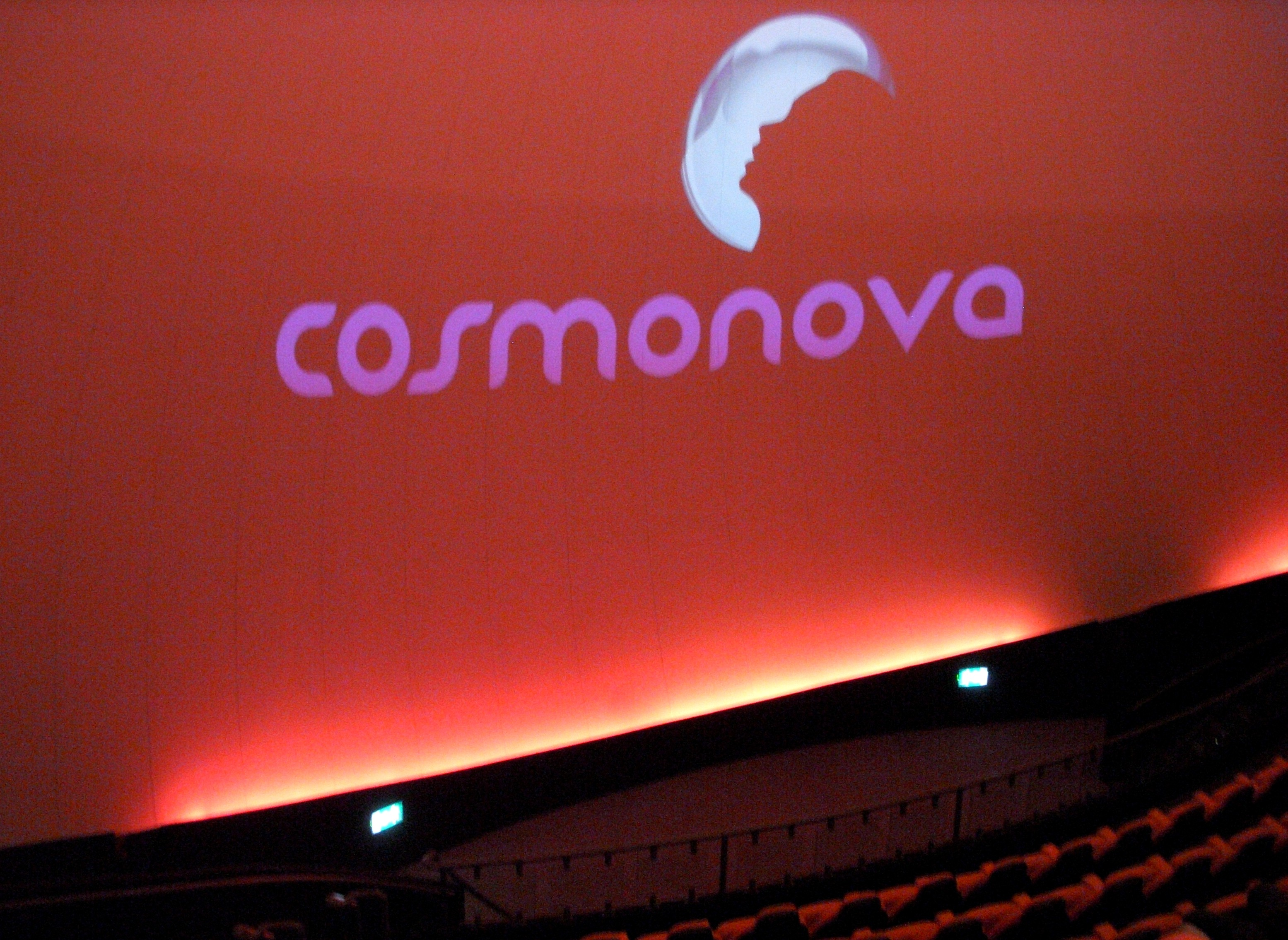 IMAX-biografen "Cosmonova" i Stockholm, salongen